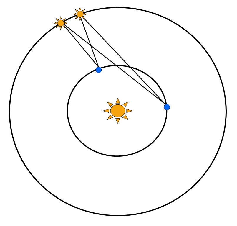 Gesucht wurde ursprünglich nur die Veränderung des Winkels zwischen 2 Sternen als Argument für die Bewegung der Erde um die Sonne. Ist man der gedachten Fixsternkugel näher, so müsste der Winkel größer sein.